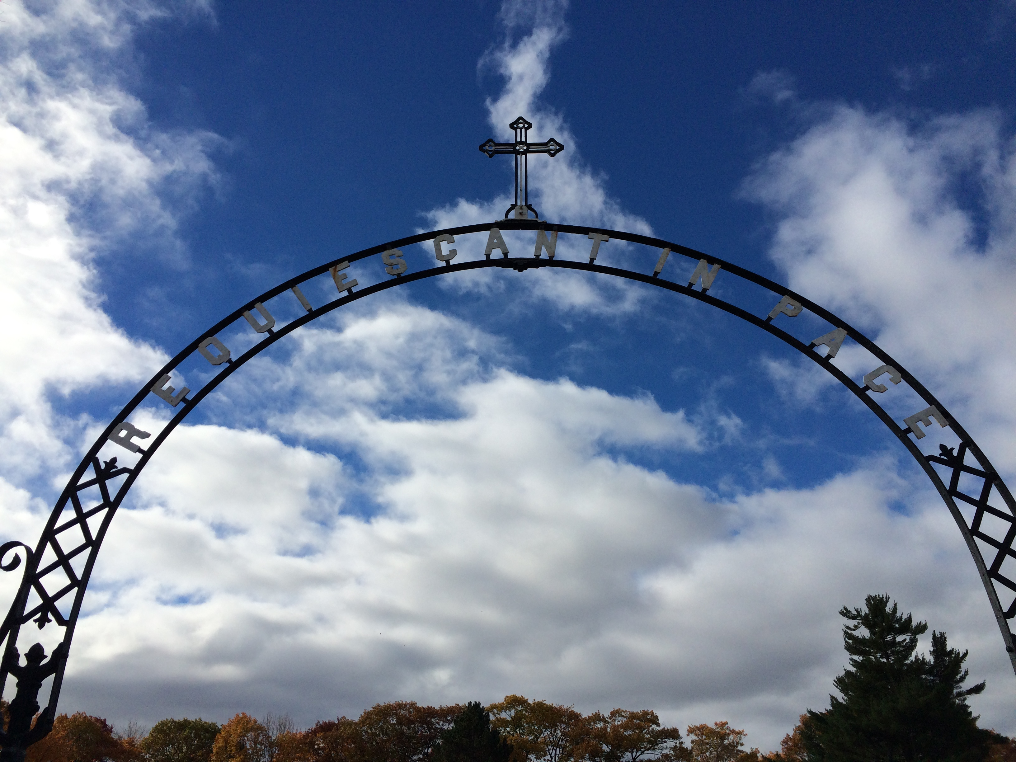 Le cimetière Saint-Michel-de-Sillery, 2041, boulevard René-Lévesque Ouest, Sillery, Québec, Québec, Canada